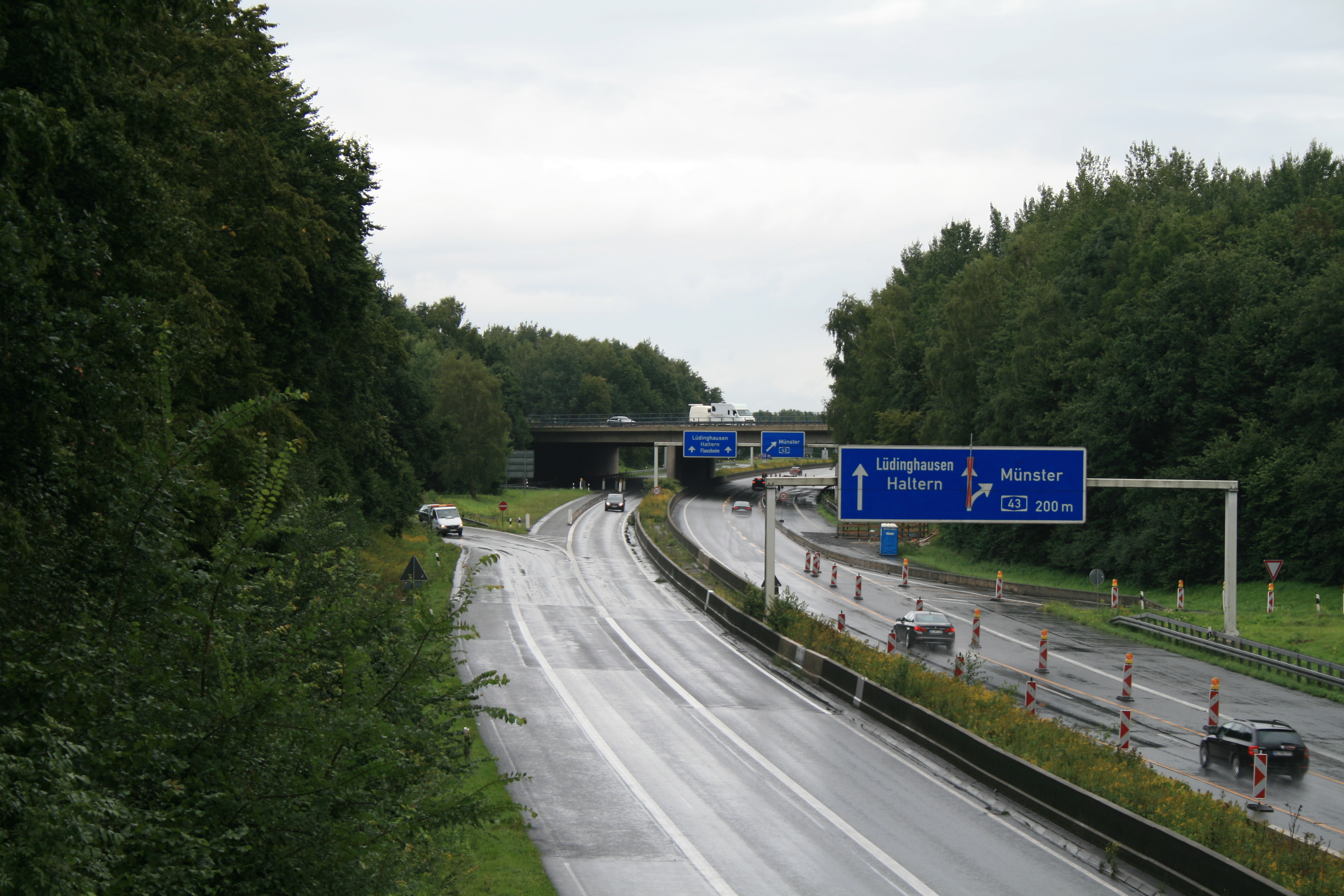 Das Autobahnkreuz Marl-Nord von einer südwestlich gelegenen Brücke über die A 52 aus gesehen.